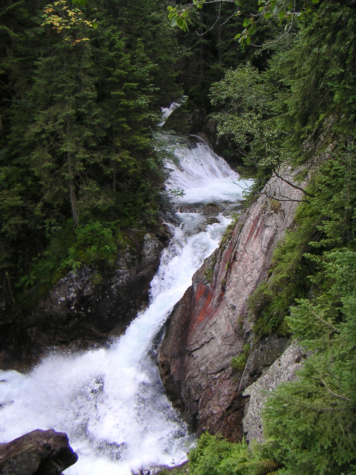 Zdjęcie Wodogrzmotów z drogi na Morskie Oko.